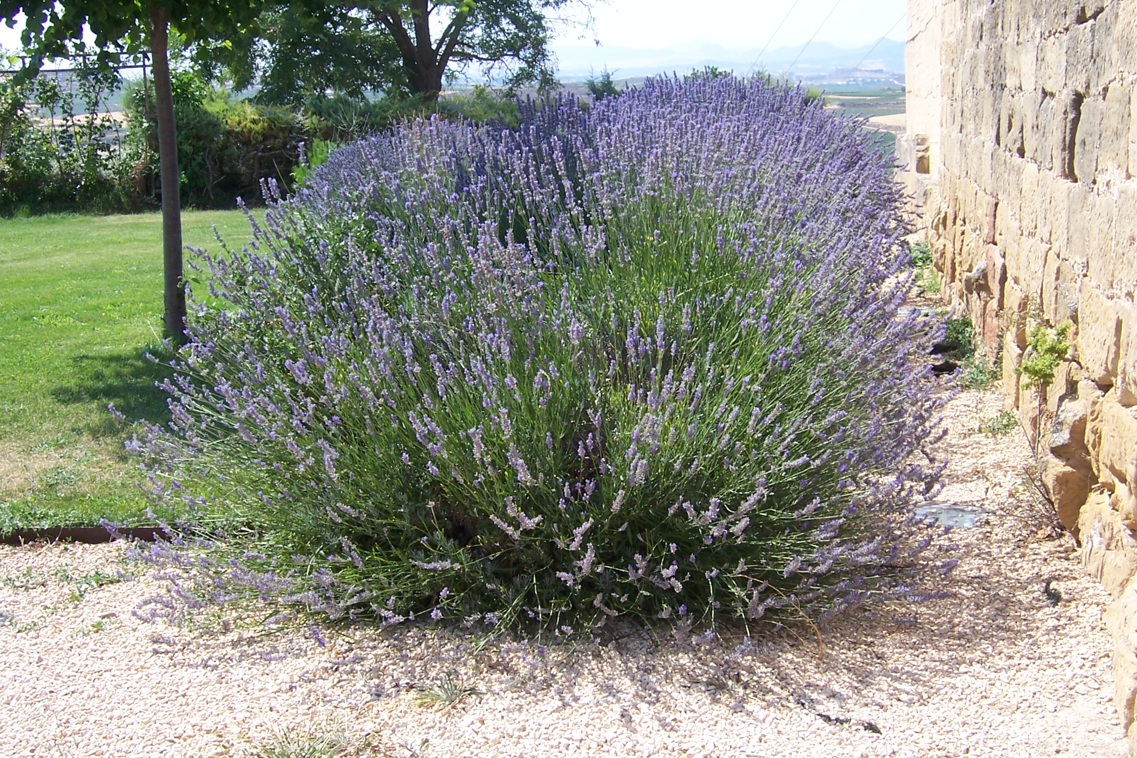 Mata de espliego en la localidad de Briones (La Rioja, España).